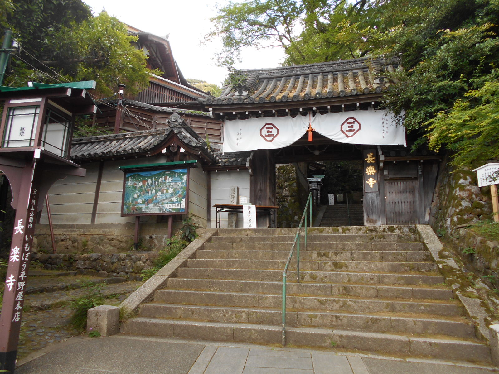 長楽寺三門